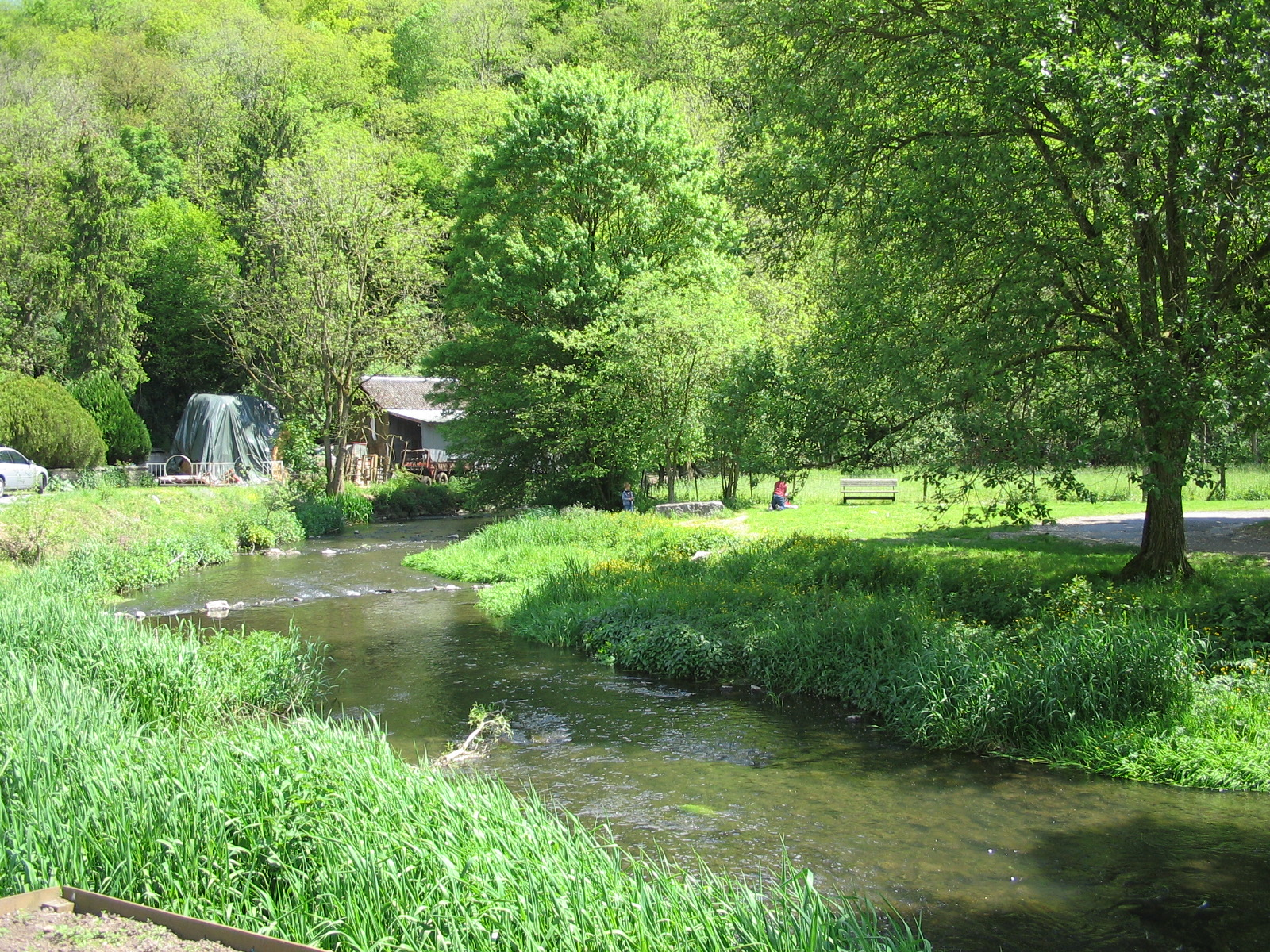 self made